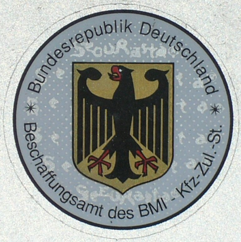 Zulassungsplakette des Beschaffungsamtes des Bundesministeriums des Innern (Deutschland): Dieses Dienstsiegel tragen alle Kfz-Kennzeichen, die dem Geschäftsbereich des BMI untergliedert sind, z.B. THW, Bundespolizei und die Wasser- und Schifffahrtsverwaltung des Bundes.